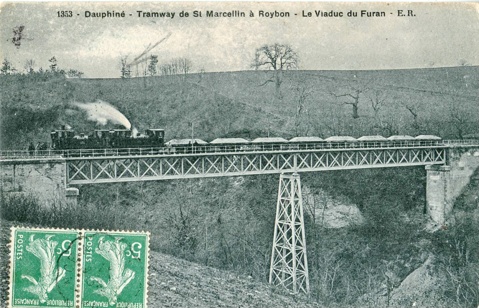 Carte postale ancienne éditée par E.R., n°1353 : Dauphiné - Tramway de St Marcellin à Roybon - Le Viaduc du Furan. On voit la rame du train d'essai, constituée de deux locomotives bi-cabines tractant 8 wagons de sable.